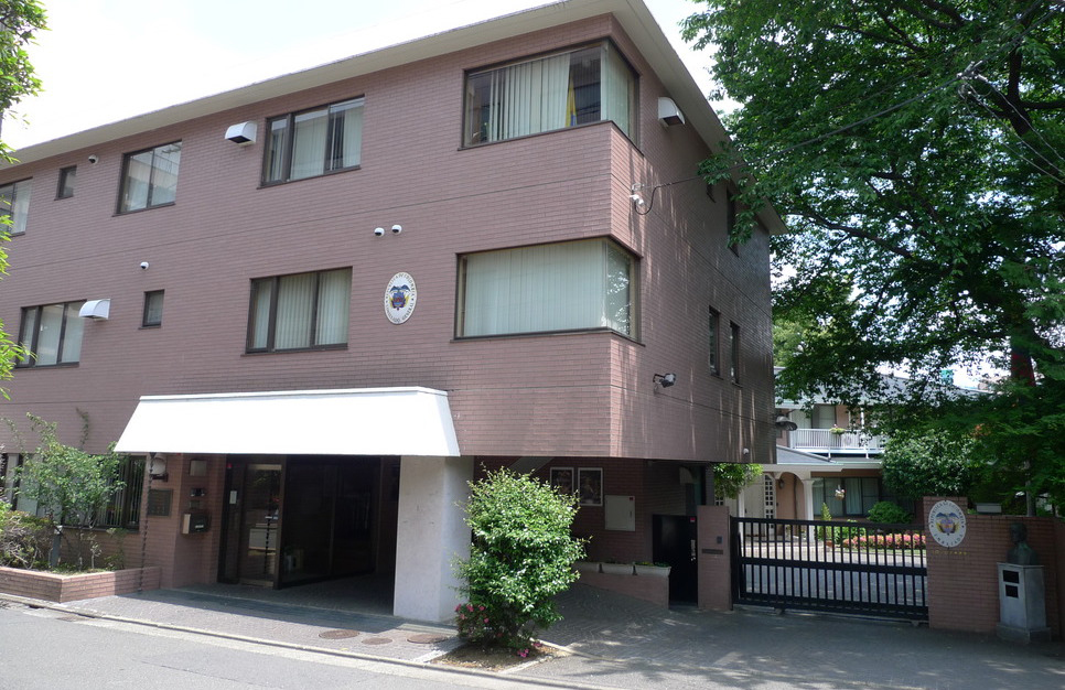 駐日コロンビア大使館の外見